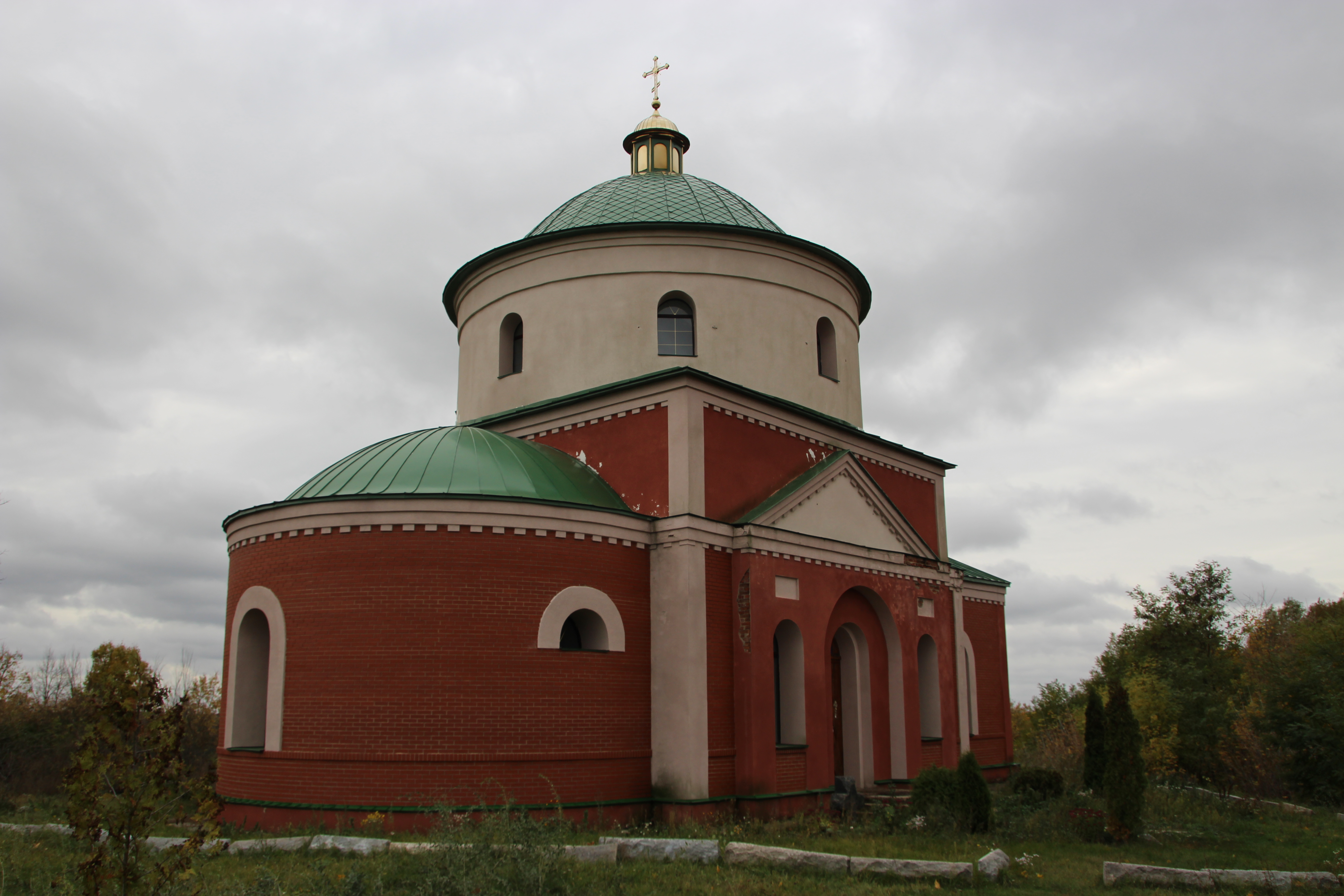 Церква Успіння Пресвятої Богородиці, село Костянтинів